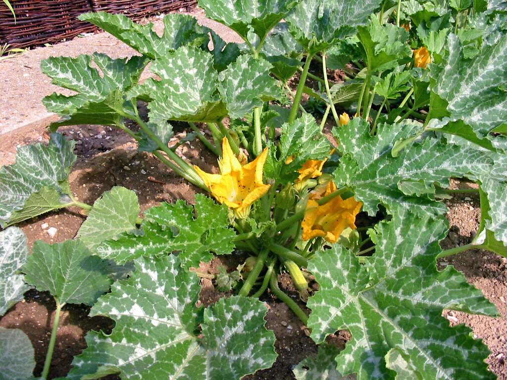 Pied de courgette verte noire maraîchère (Truffaut) Photo JH Mora, juin 2005